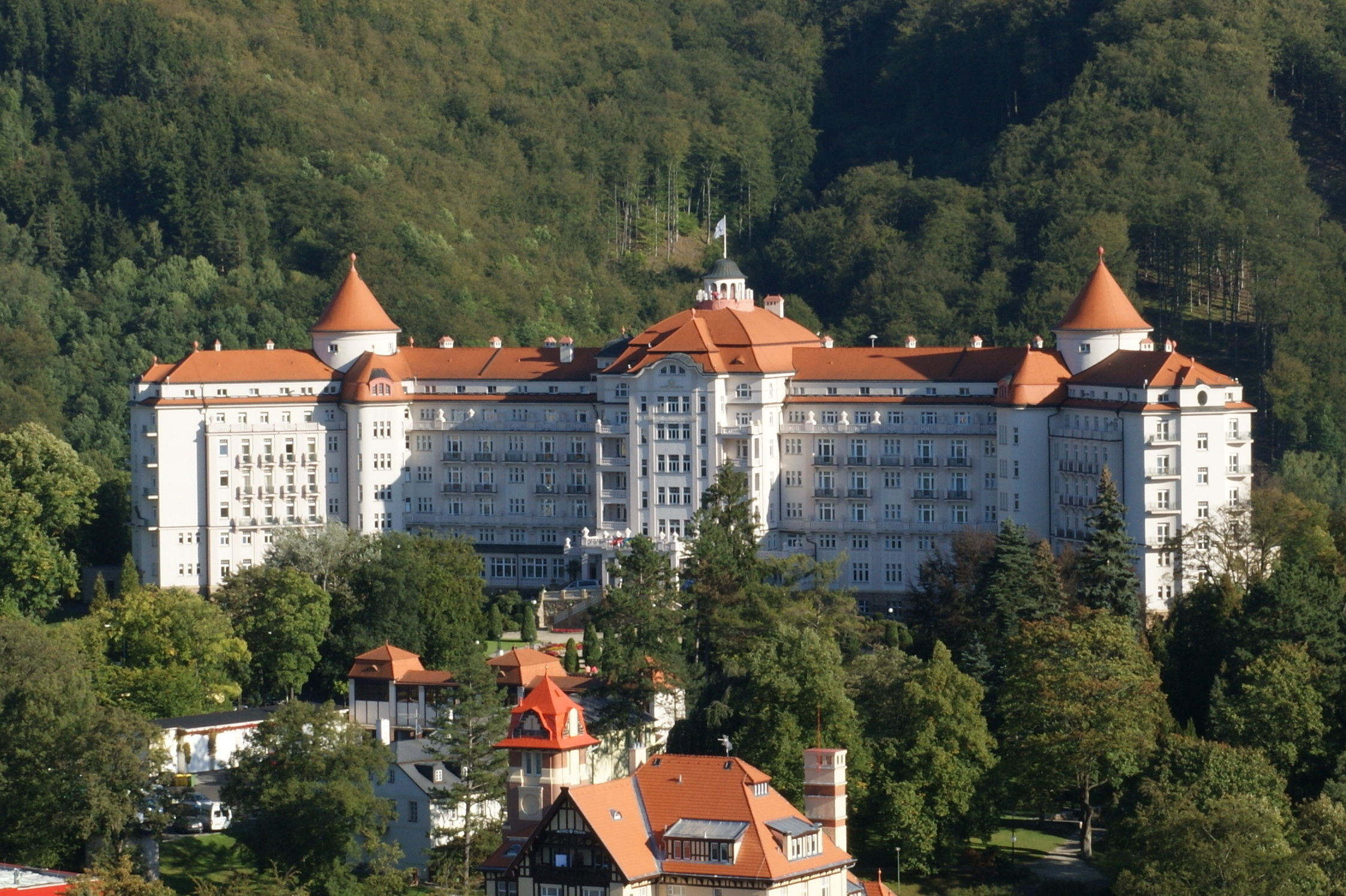 Hotel Imperiál, Libušina 1212/18, Karlovy Vary.